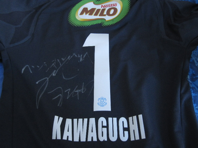 Fußballtrikot von Yoshikatsu Kawaguchi (Júbilo Iwata), für einen österreichischen Fan signiert